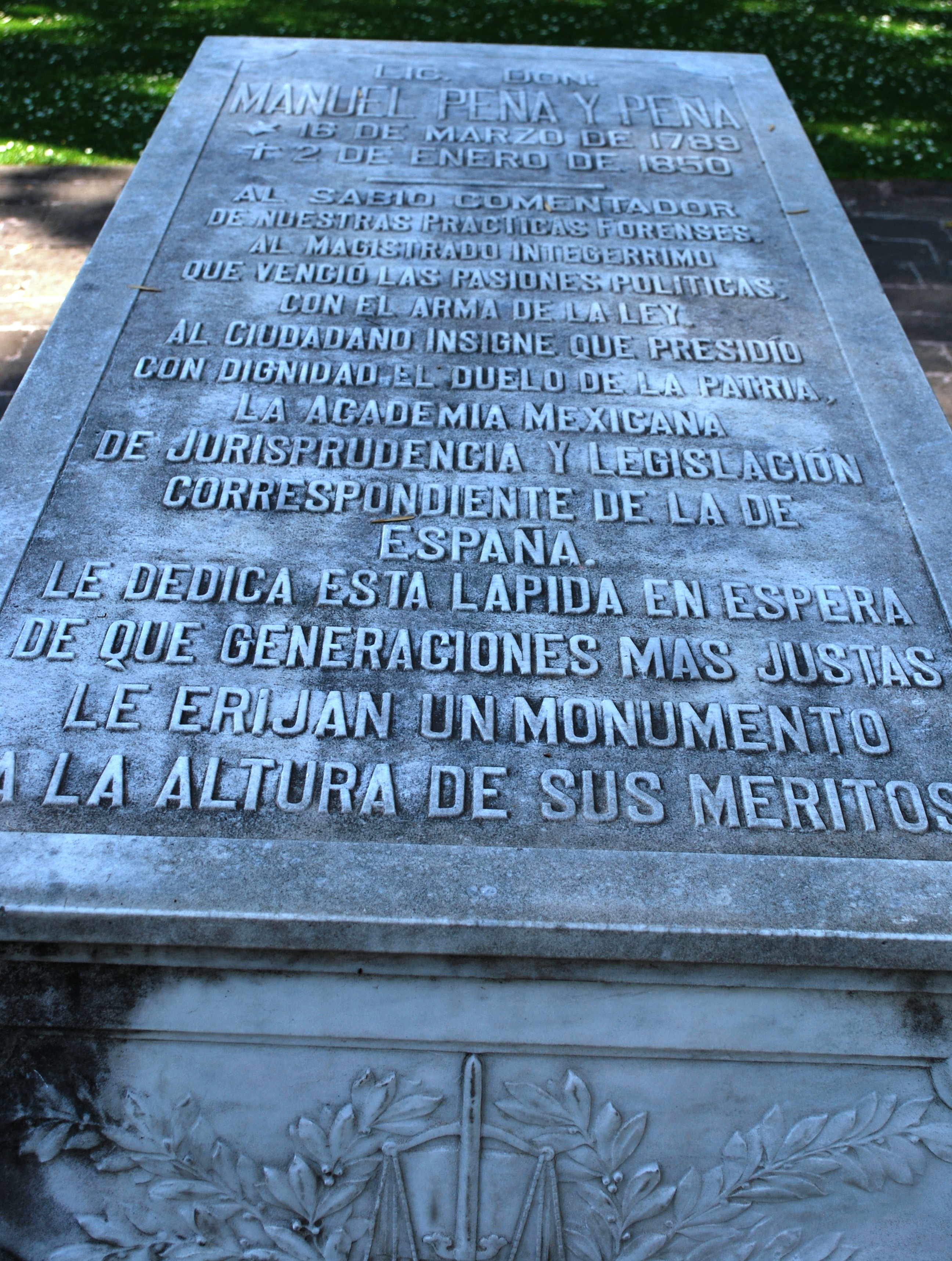 Tomb of Manuel Peña y Peña in the Panteón Civil de Dolores in Mexico City.